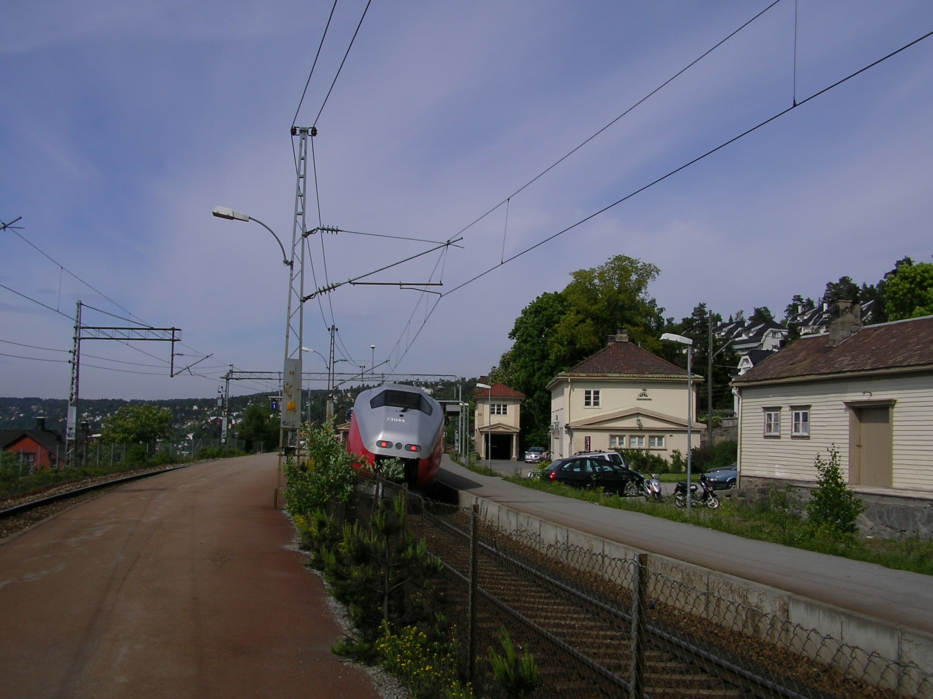 Ljan stasjon i 2006